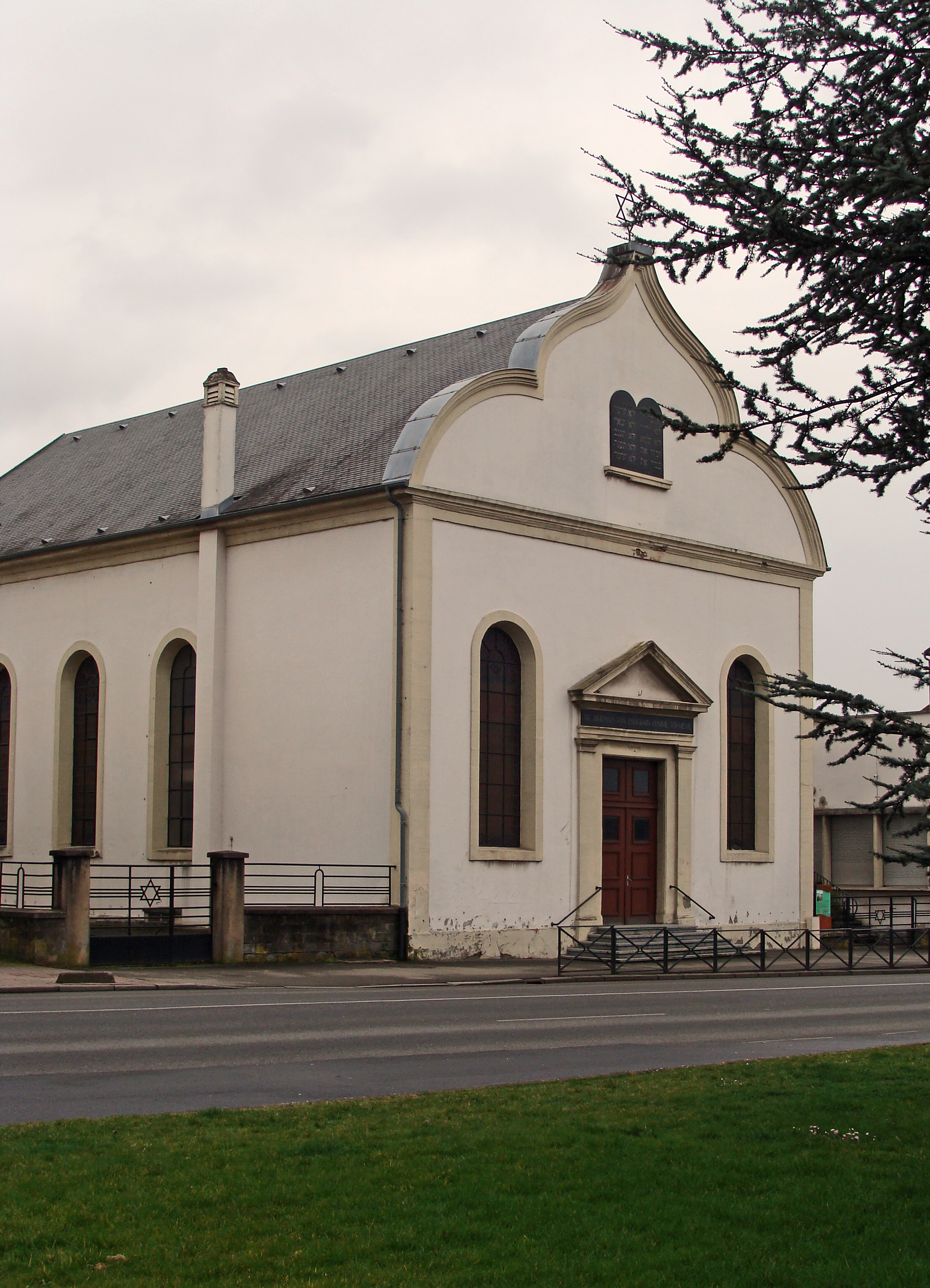 Synagogue de Forbach, avenue Saint-Rémy, construite de 1835 à 1836.